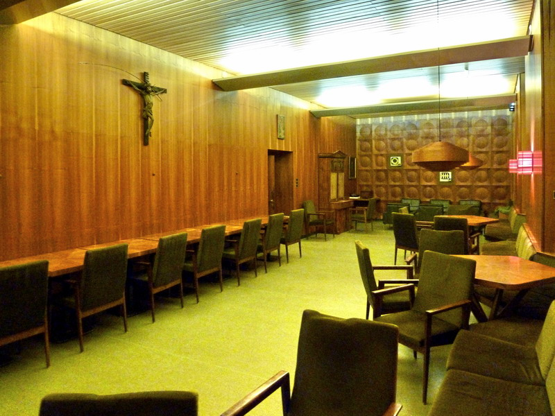 Architekt Hans Pfann, 1972, siehe Wiki de Artikel über Stift Heiligenkreuz